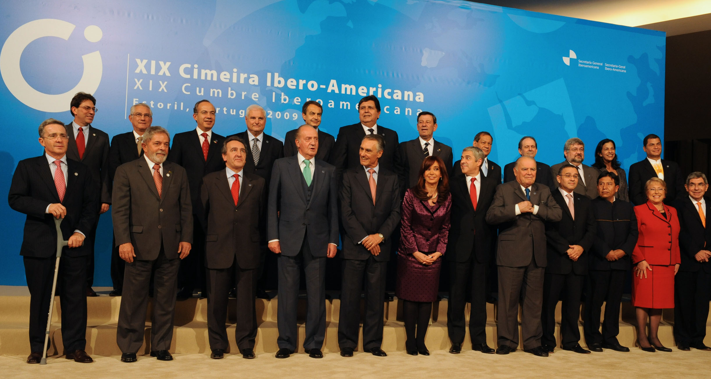 La presidenta Cristina Fernández participa de la Foto de Familia